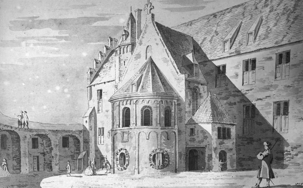 Valkhof: gezicht in het 2e binnenplein, naar een tekening door C.Pronk 1728 in het Gemeente Museum Nijmegen